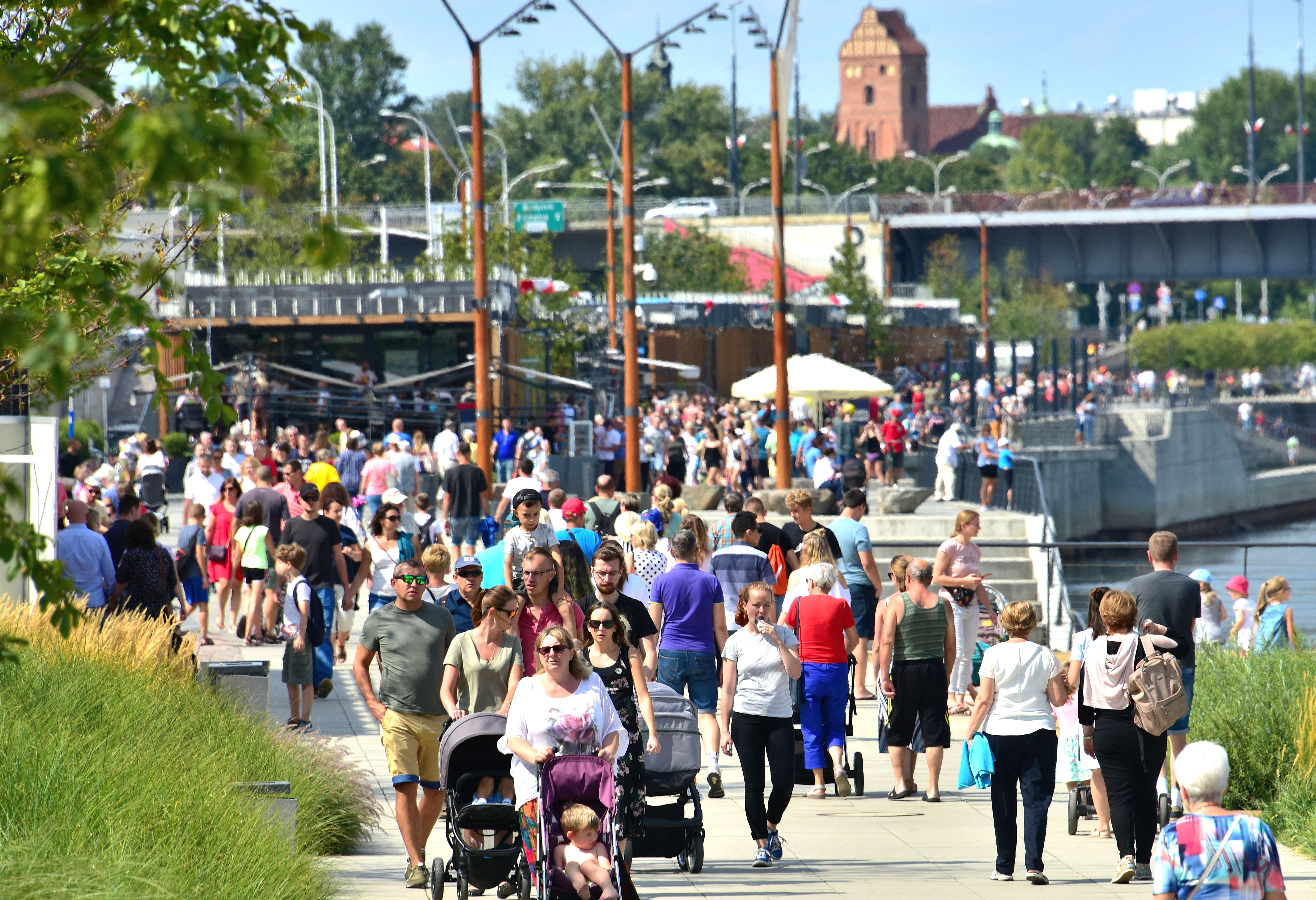 Bulwary wiślane w Warszawie - bulwar gen. George'a Smitha Pattona